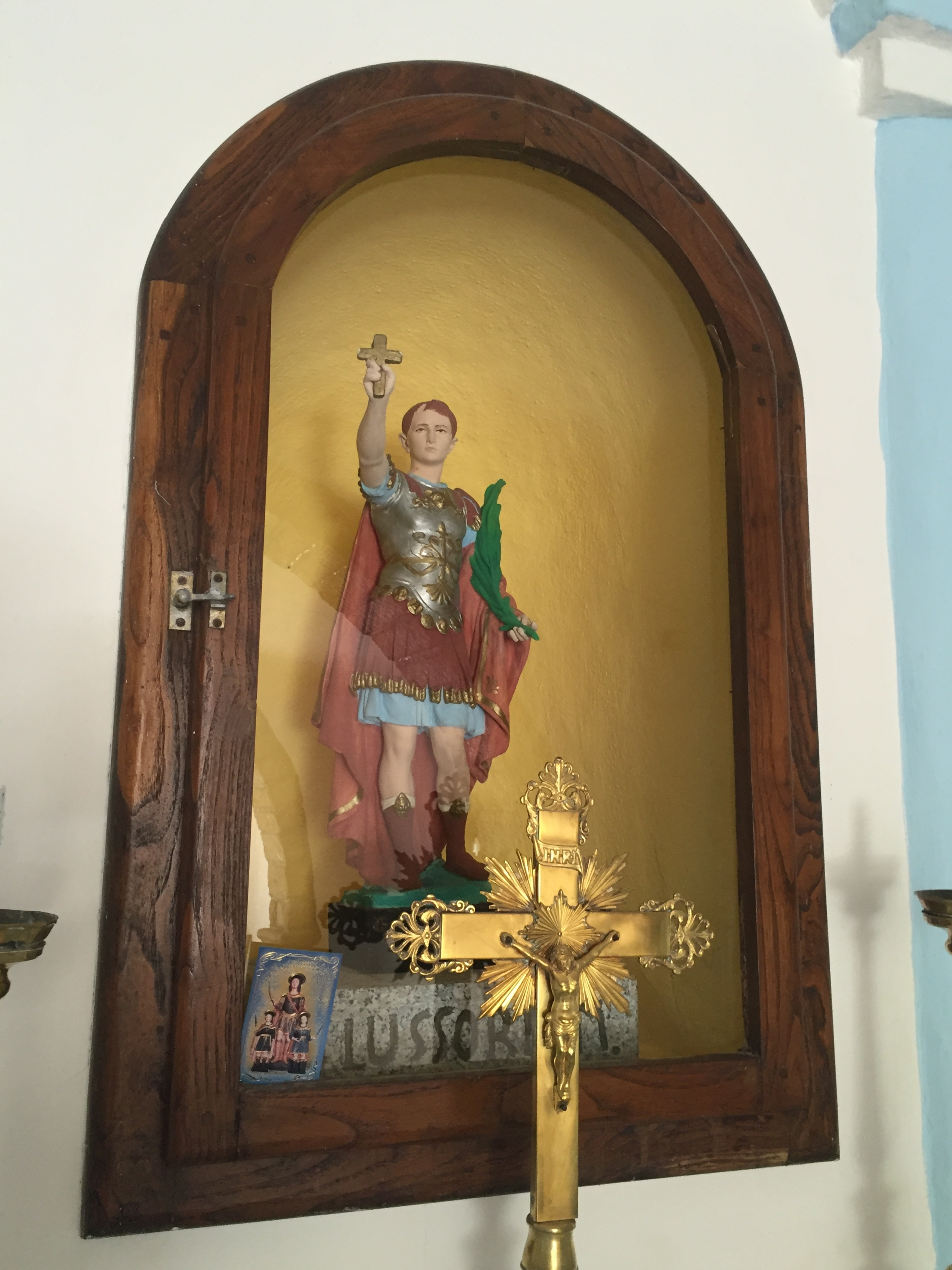 Aggius, 2016.